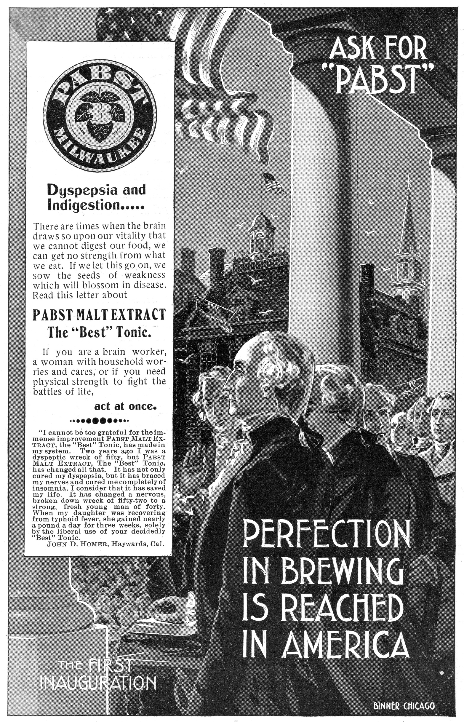 Pabst Malt Extract advertisement,1897